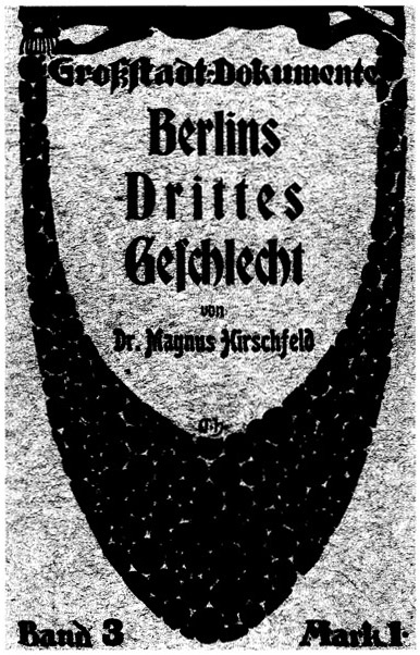 Titelblatt "Magnus Hirschfeld: Berlins Drittes Geschlecht"